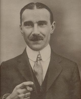 Bok de Korver (1883-1957), Nederlands voetballer uit het begin van de twintigste eeuw, met sigaar.